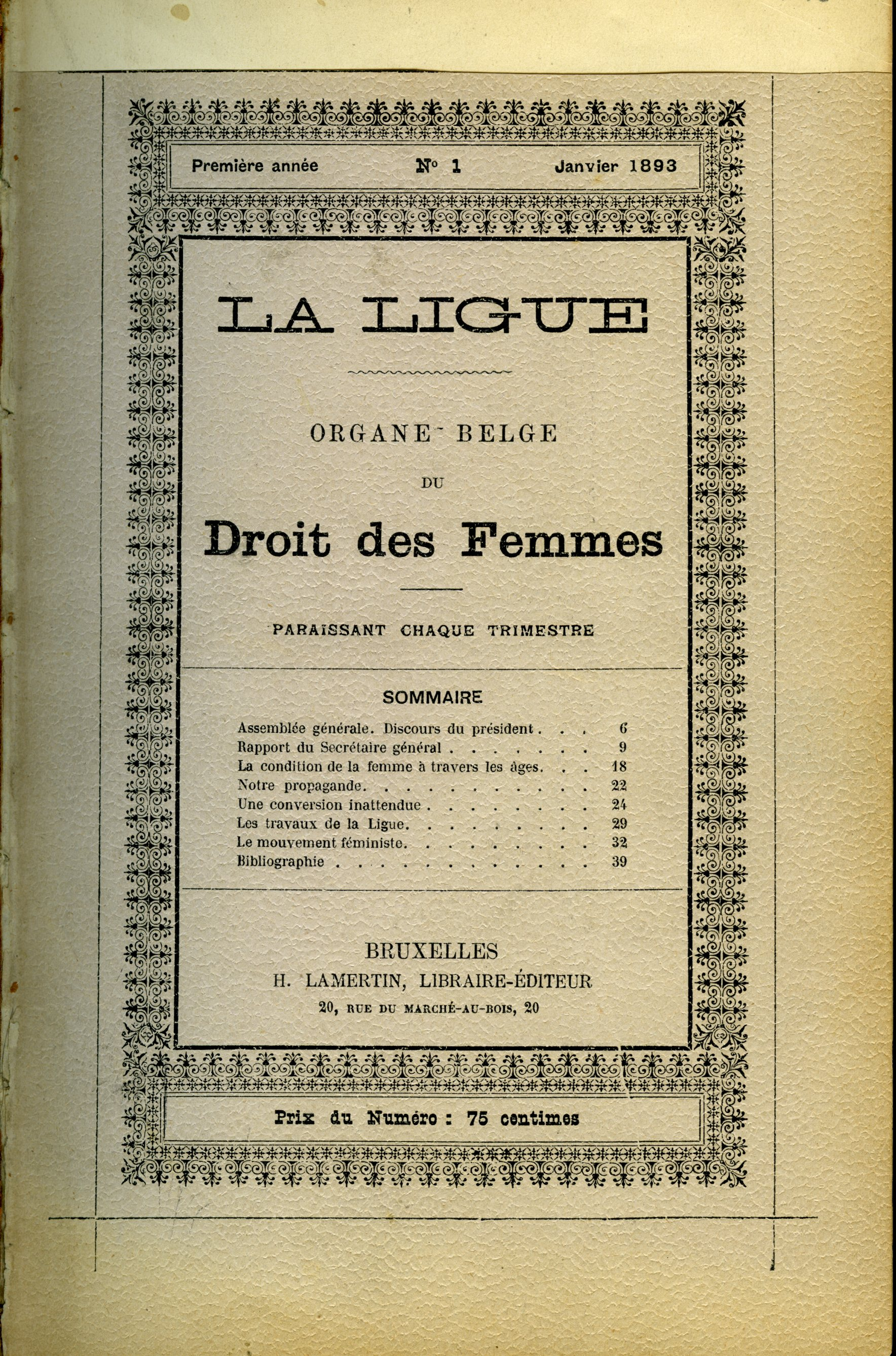 Couverture de la première revue de la Ligue belge du droit des femmes à l'occasion de leur Assemblée Générale en 1893